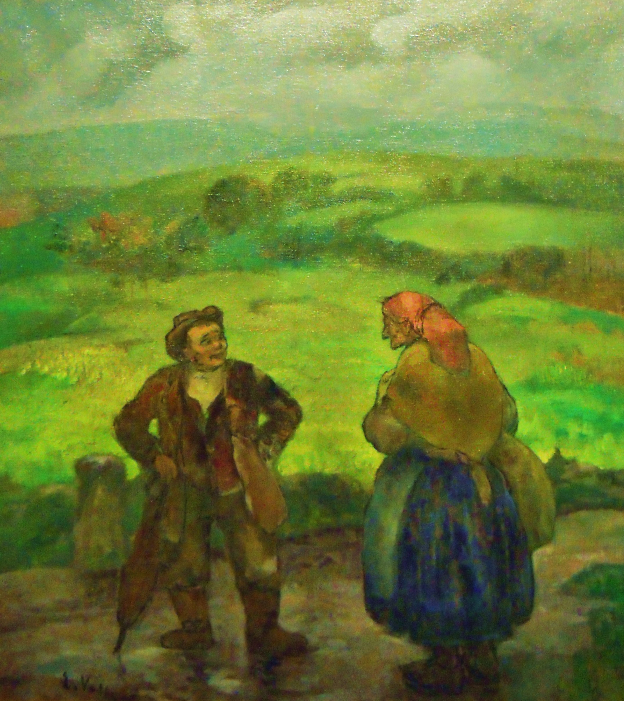 Obra d'Evaristo Valle (Muséu de Belles Artes d'Uviéu)